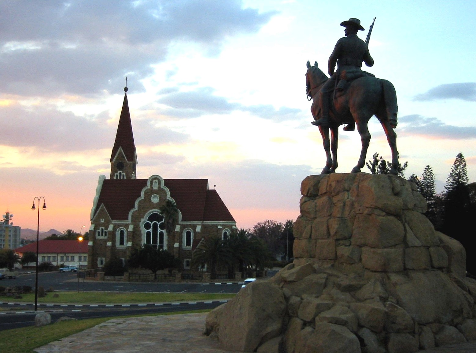 Deutsches Reiterdenkmal mit Christuskirche in Windhoek/Namibia